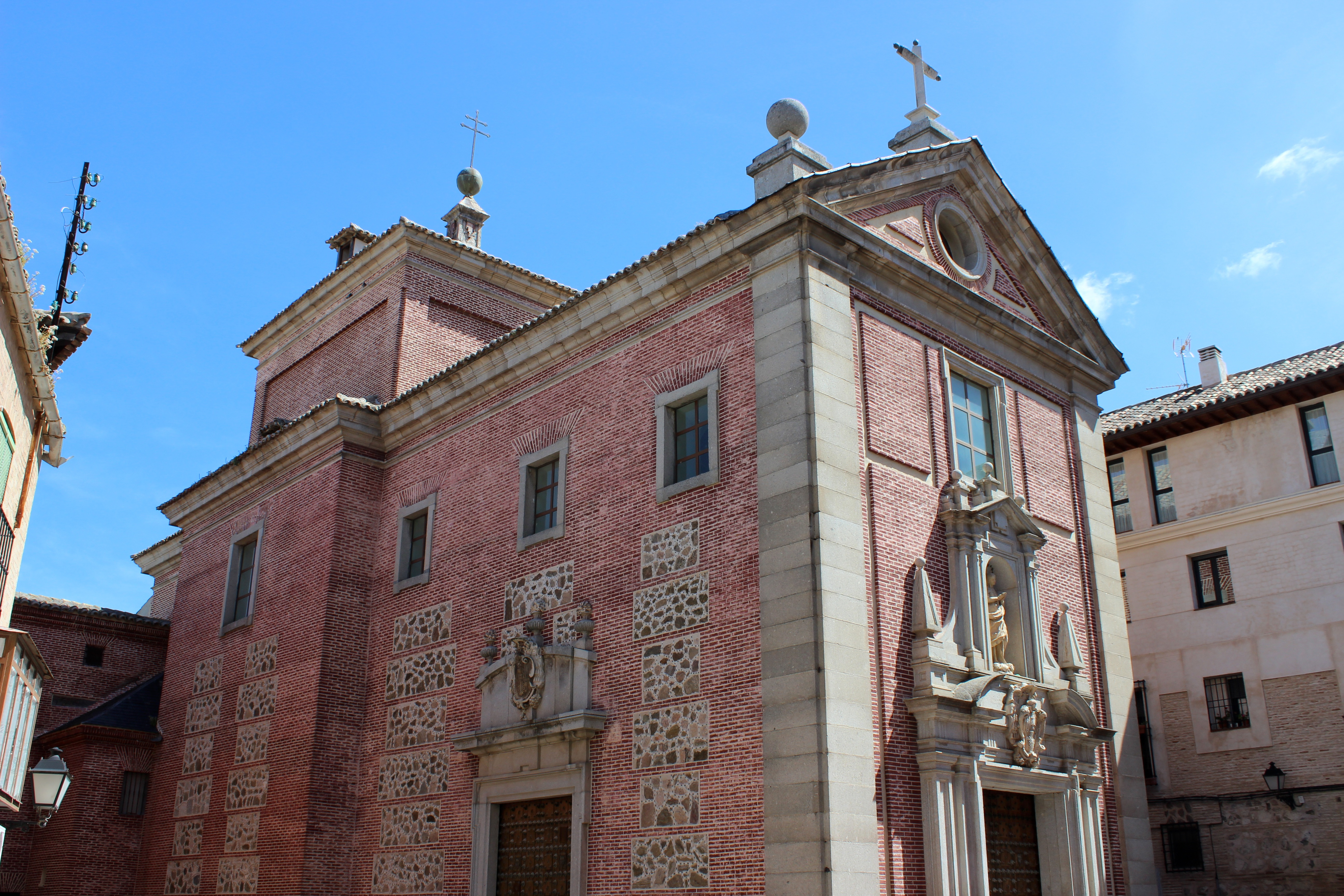 Toledo. Convento de la Purísima Concepción.